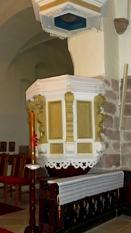 Raszów, kościół fil. p.w. Niepokalanego Poczęcia NMP, XV